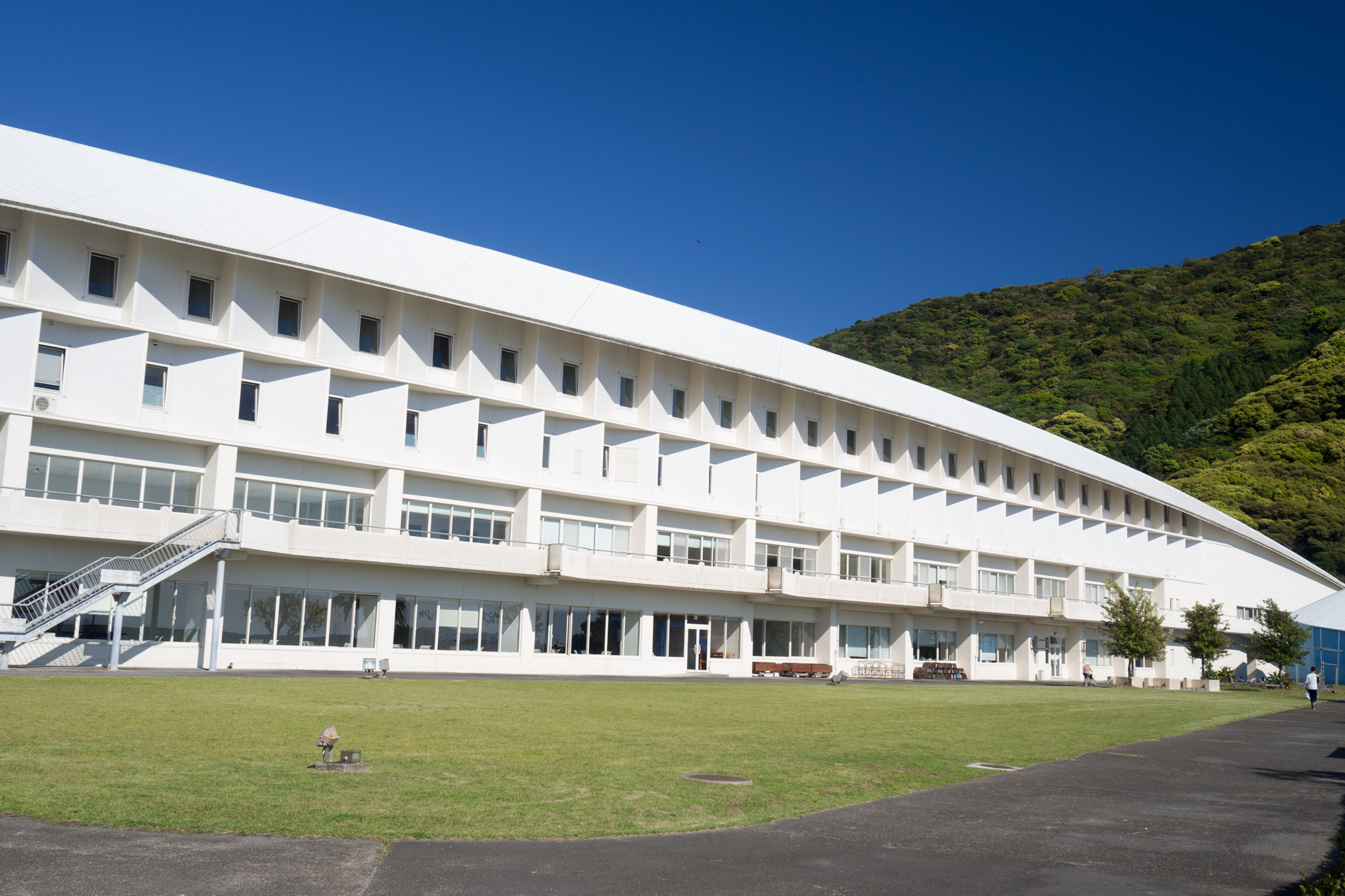 これは大分県佐伯市蒲江にあるマリンカルチャーセンターを海側から撮影した写真になります。宿泊施設になります。